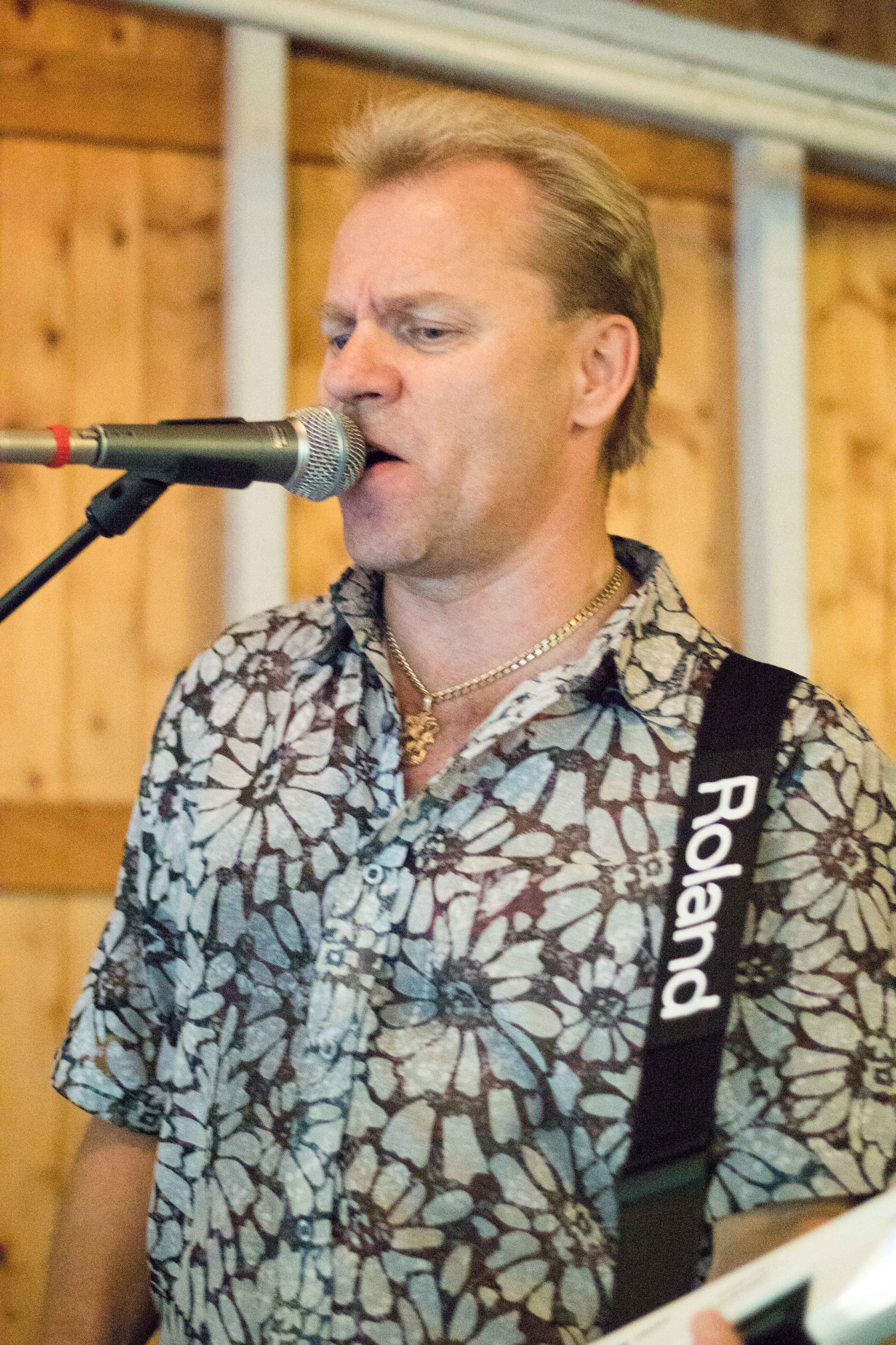 Jukka Lampela suomalainen laulaja